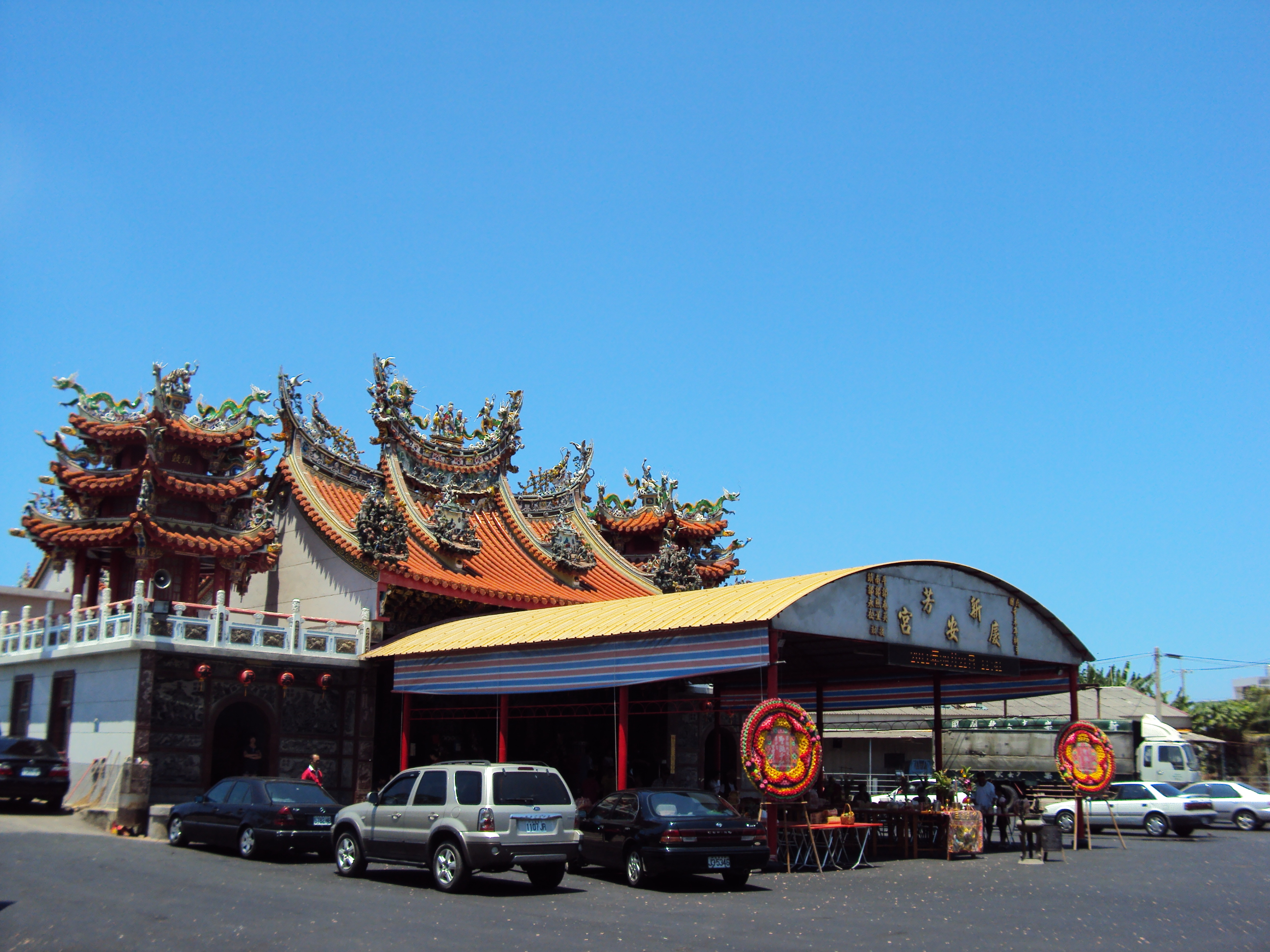 臺南市學甲區三慶里新芳慶安宮。